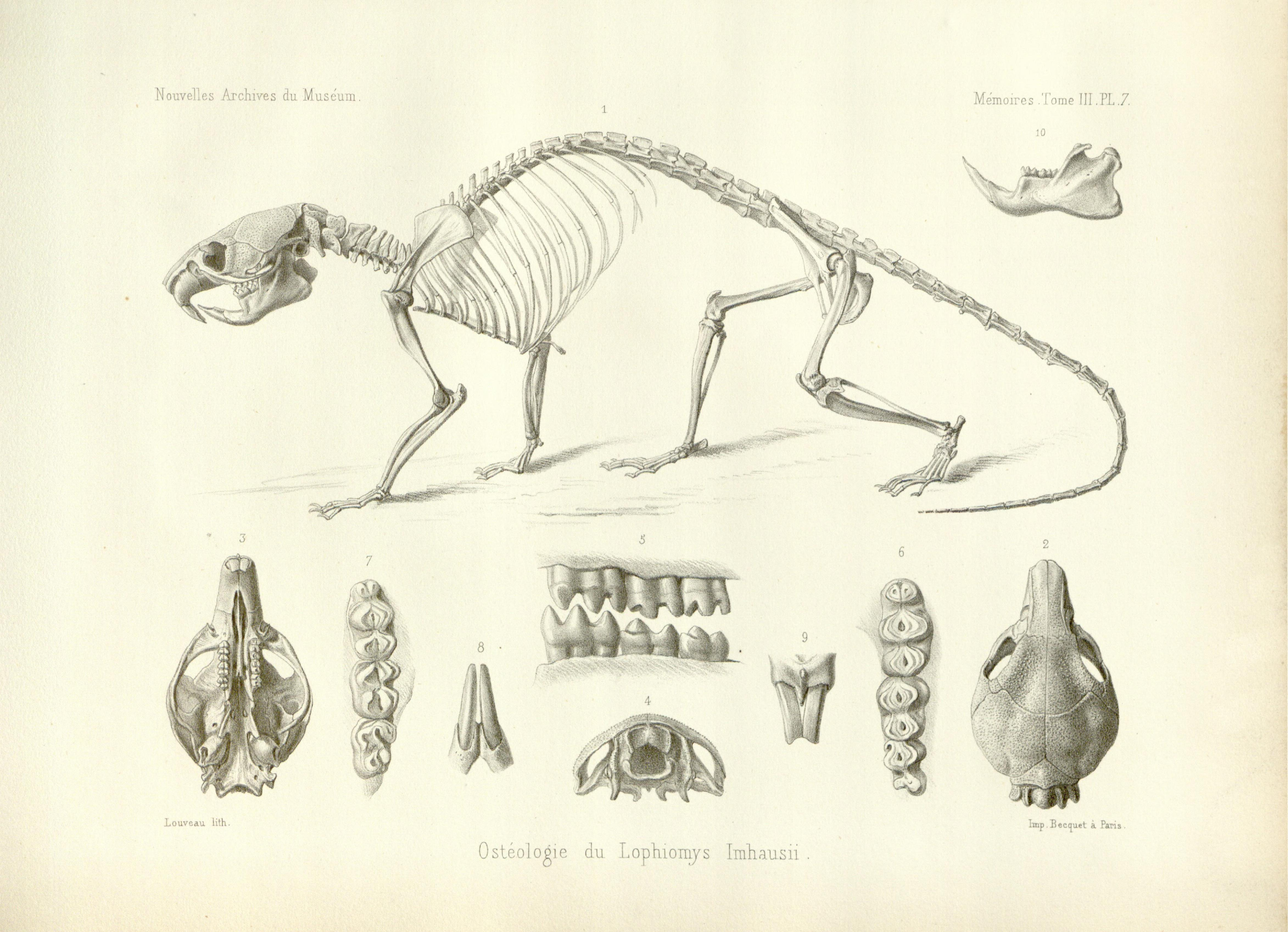 Lophiomys from Nouvelles Archives du Muséum d'Histoire Naturelle de Paris 1867. Same source as File:Lophiomys imhausi.jpg. From page 117: Fig. 1. Squelette de Lophiomys Imhausii, un peu réduit. Fig. 2. Tête, vue par sa face supérieure, de grandeur naturelle. Fig. 3. Face inférieure de la même. Fig. 4. Face postérieure de la même. Fig. 5. Dents, vues de profil et grossies. Fig. 6. Série de molaires supérieures grossies. Fig. 7. Série de molaires inférieures grossies. Fig. 8. Incisives inférieur grossies. Fig. 9. Incisives supérieures grossies. Fig. 10. Mâchoire inférieure, vue de côté, de grandeur naturelle.